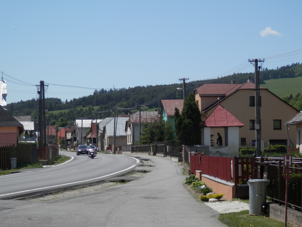 Plavnica okres Stará Ľubovňa.